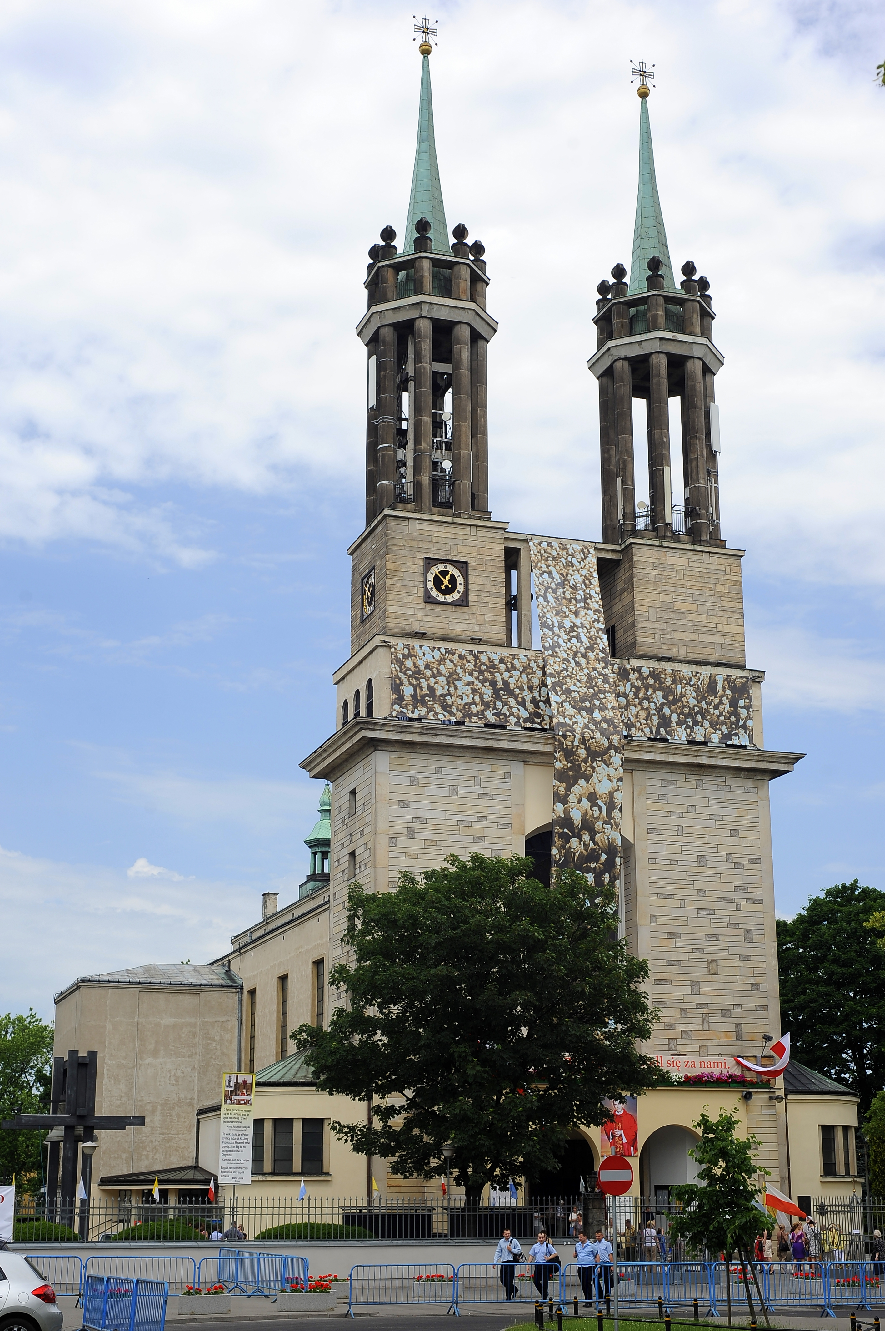 Kościół św. Stanisława Kostki w Warszawie